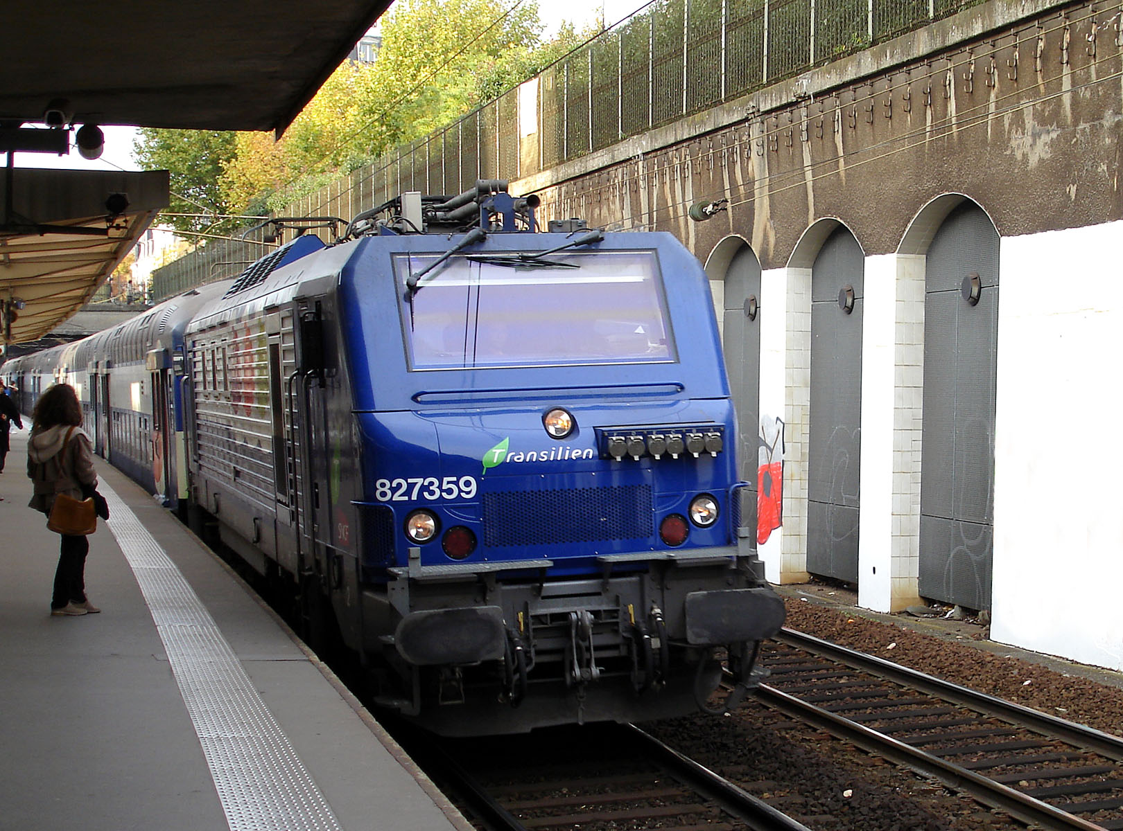 La gare de Bois-Colombes, Hauts-de-Seine, France. Une BB 27300 tracte une rame composée de VB 2N en direction de Paris-Saint-Lazare.